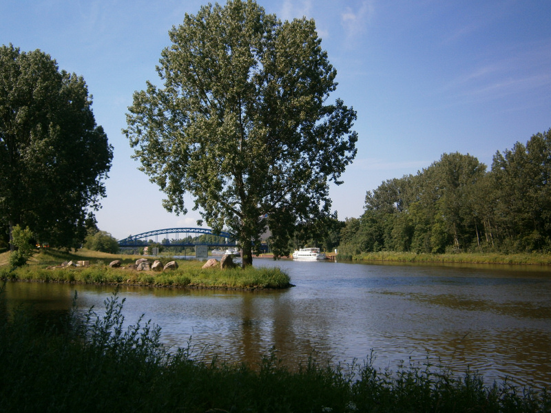 Weser River View